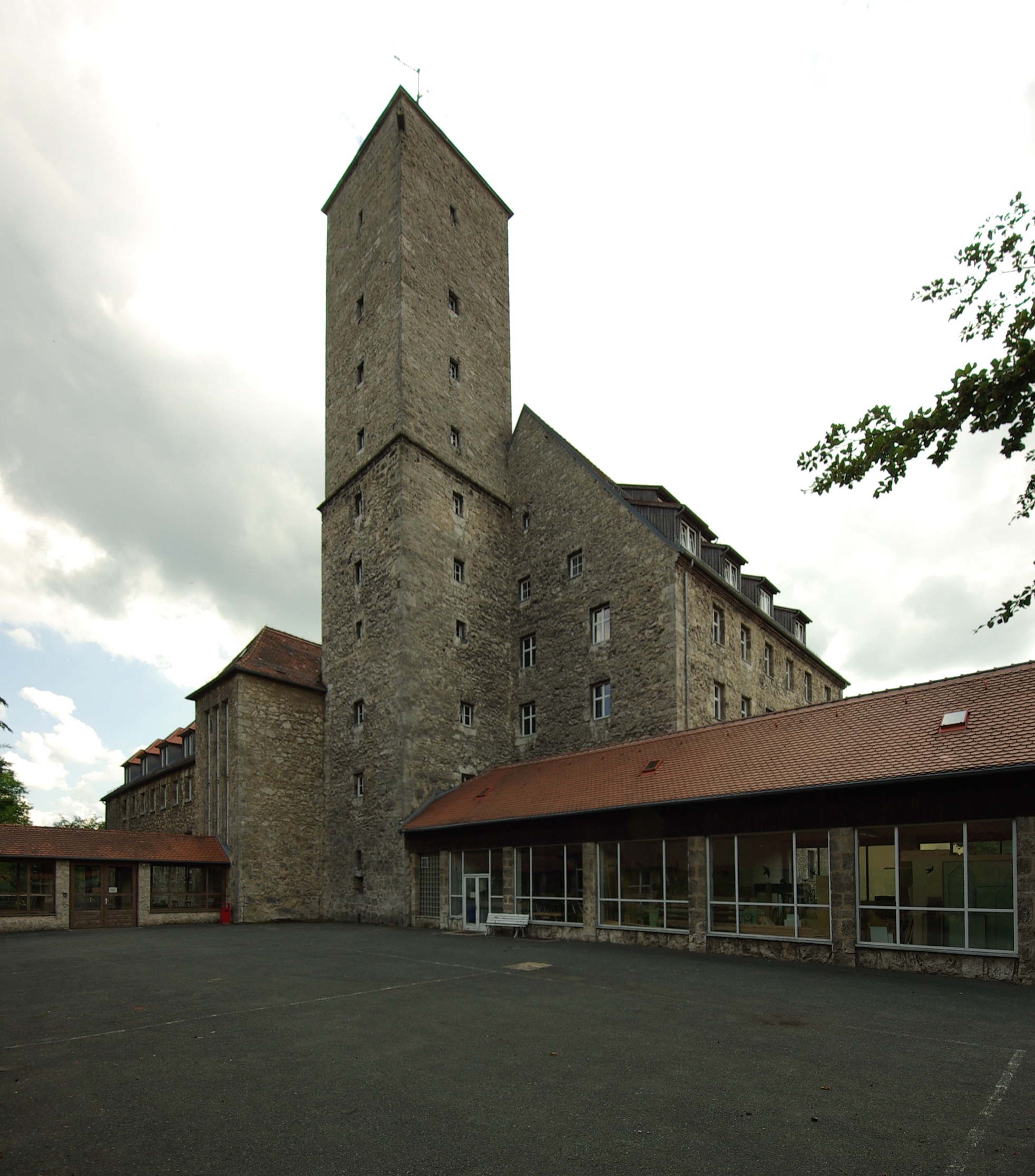 Burg Feuerstein bei Ebermannstadt